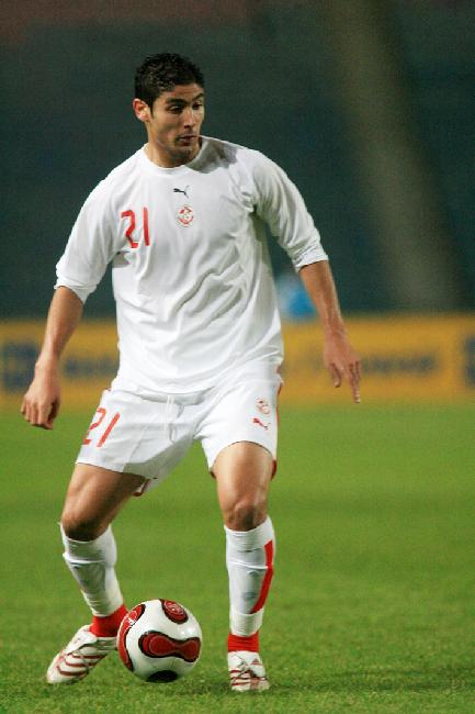 photo du joueaur majdi traoui